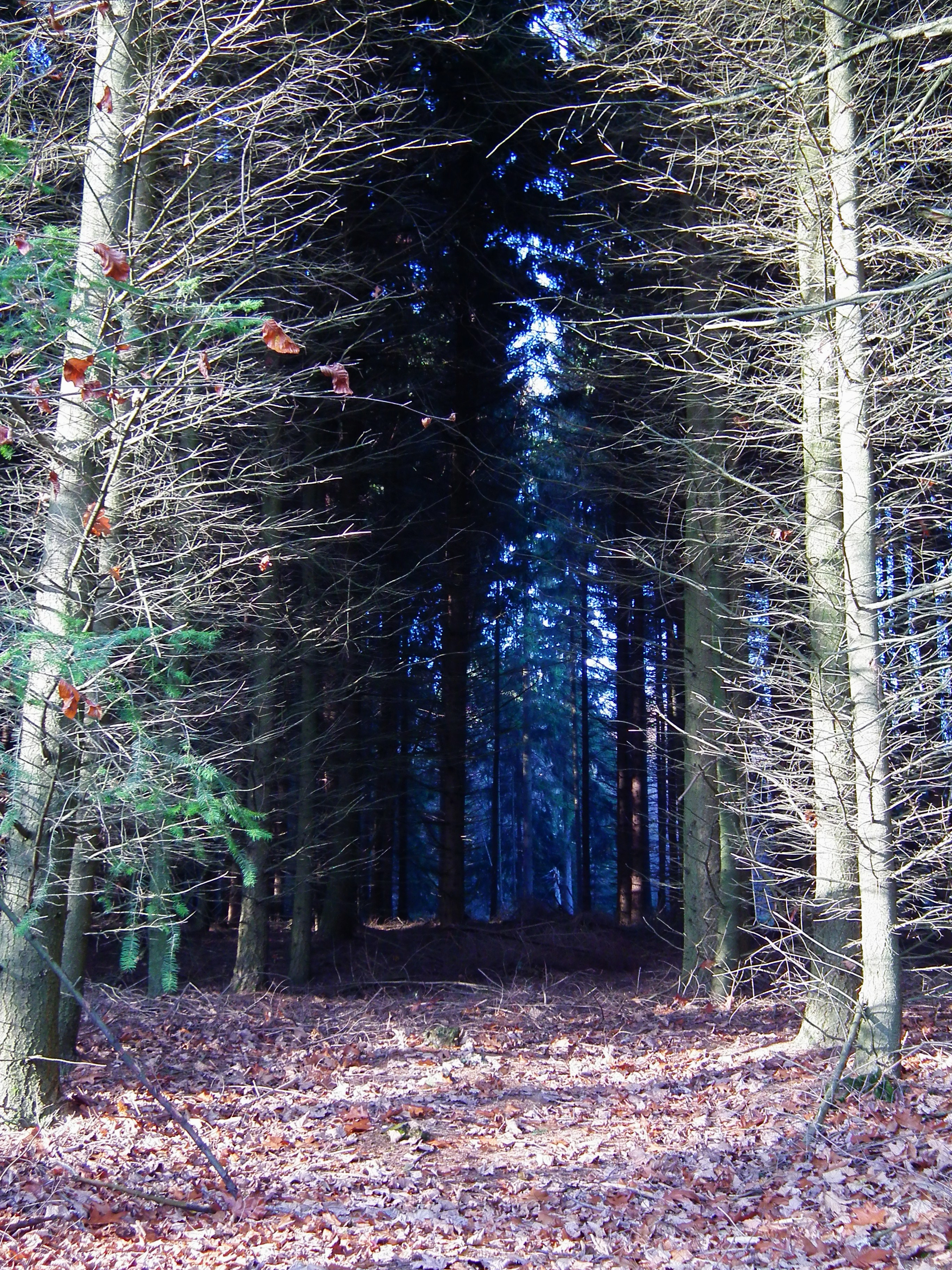 Waldweg auf der Tromm (Hessen, Deutschland)